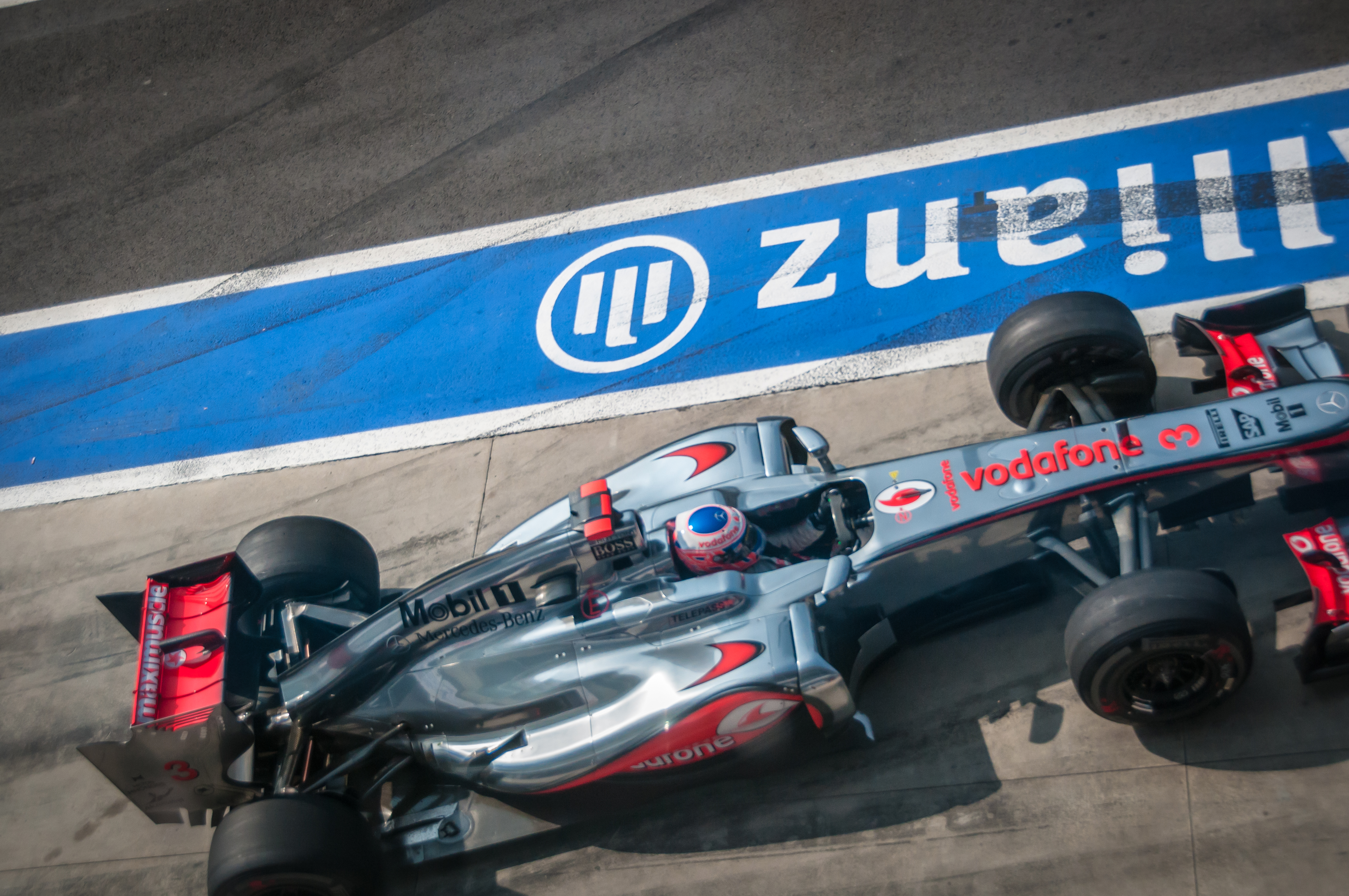 Button Monza 2012